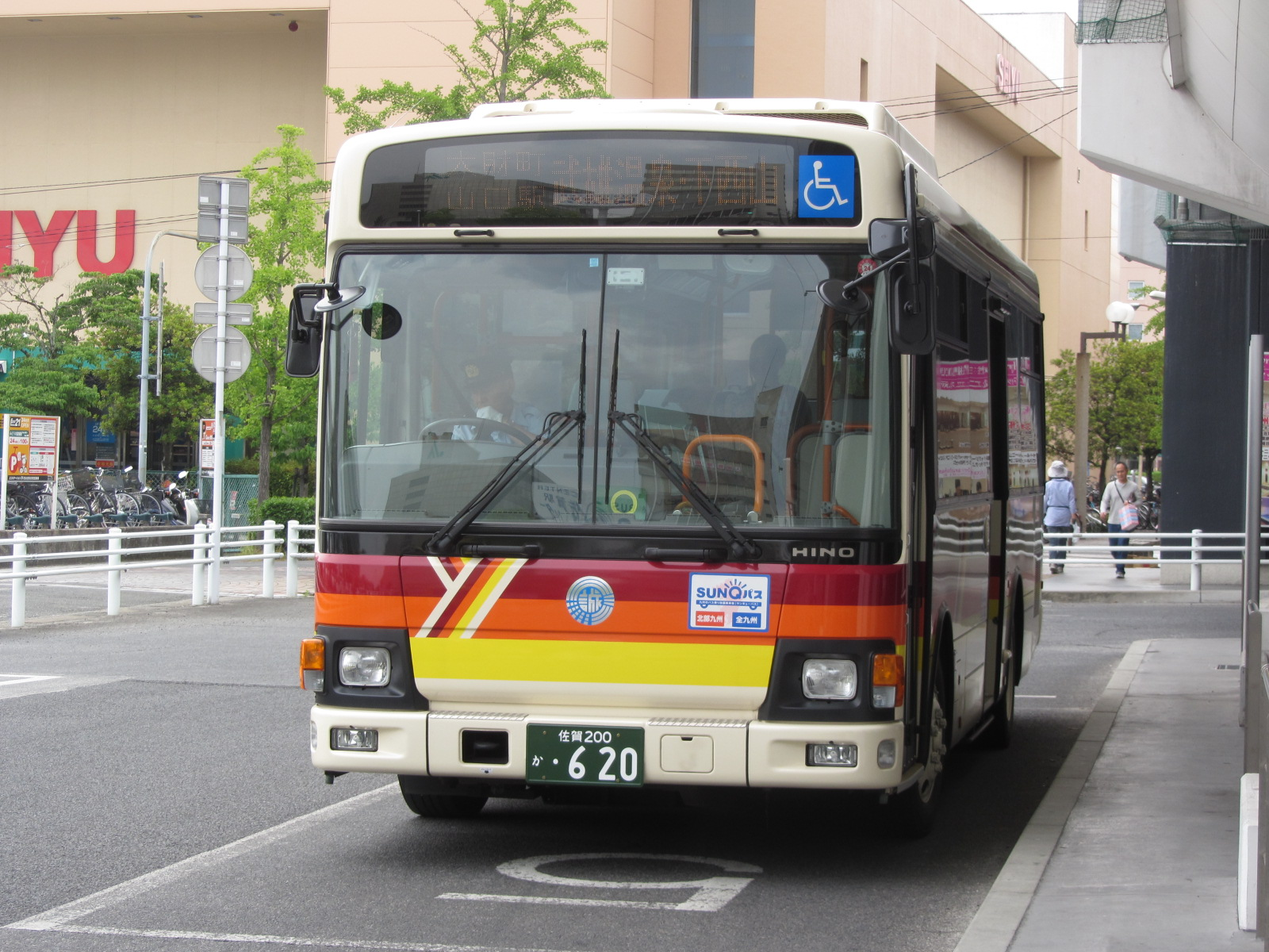 祐徳バス新カラー車。